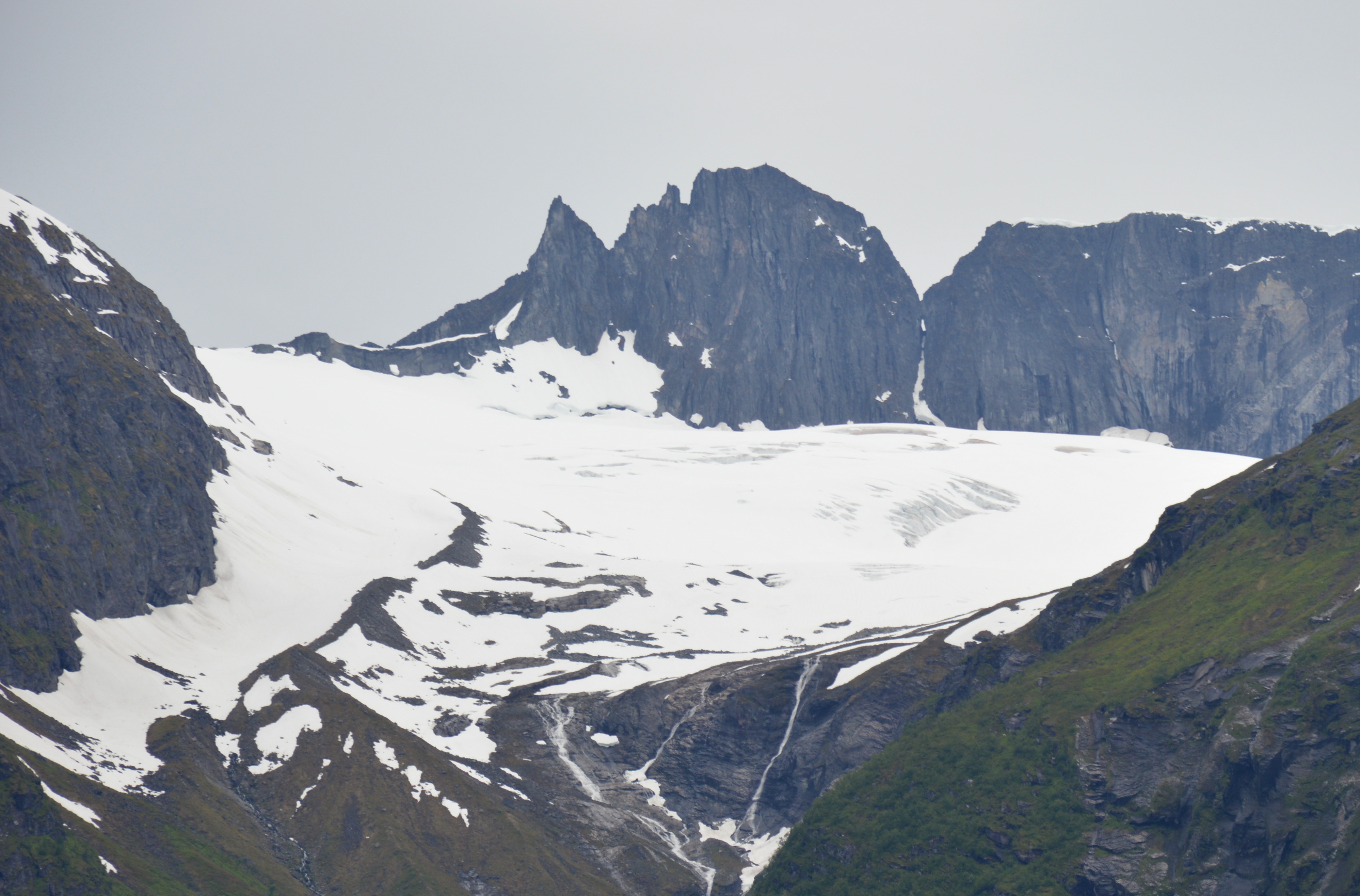 Tindefjellbreen